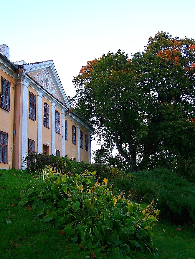 Pałac letni biskupów warmińskich w Smolajnach